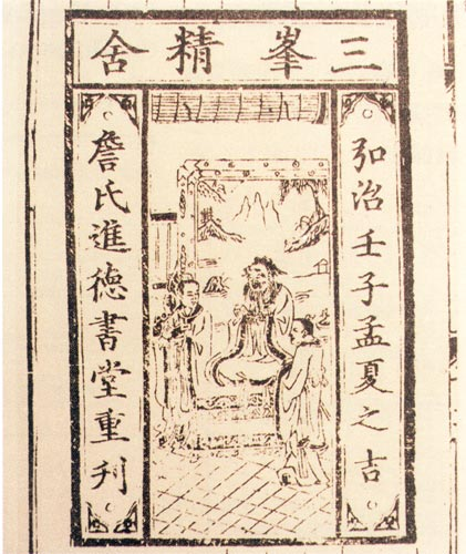 中文（中国大陆）: 明代建阳进德堂刻印的《玉篇》